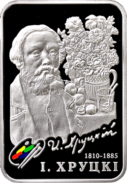 Беларуская (тарашкевіца): Памятная манэта "I. Хруцкі"